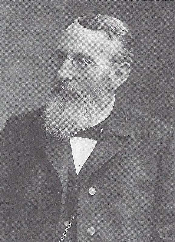 Porträtfotografie von Wilhelm Pfeffer